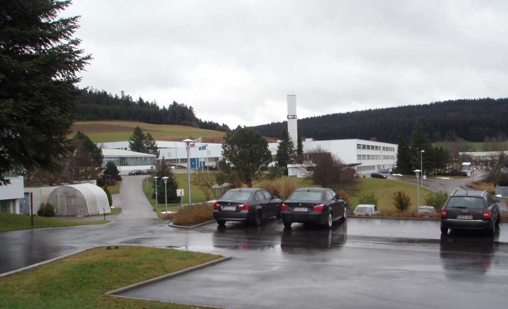 Fischerwerke, Waldachtal, Germany